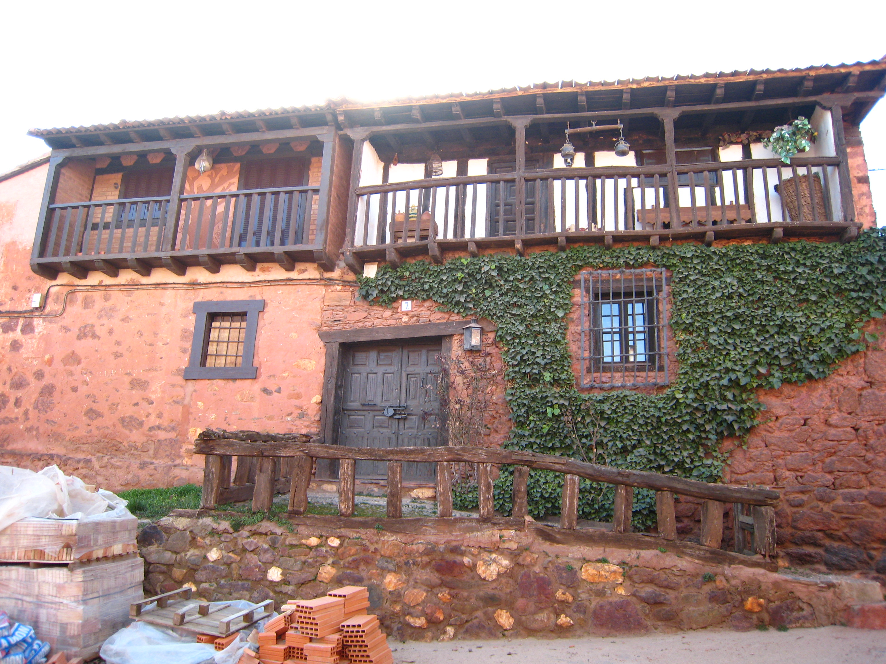 Madriguera (Segovia), pueblo "rojo" por su arquitectura tradicional. - OpenStreetMap (Info)